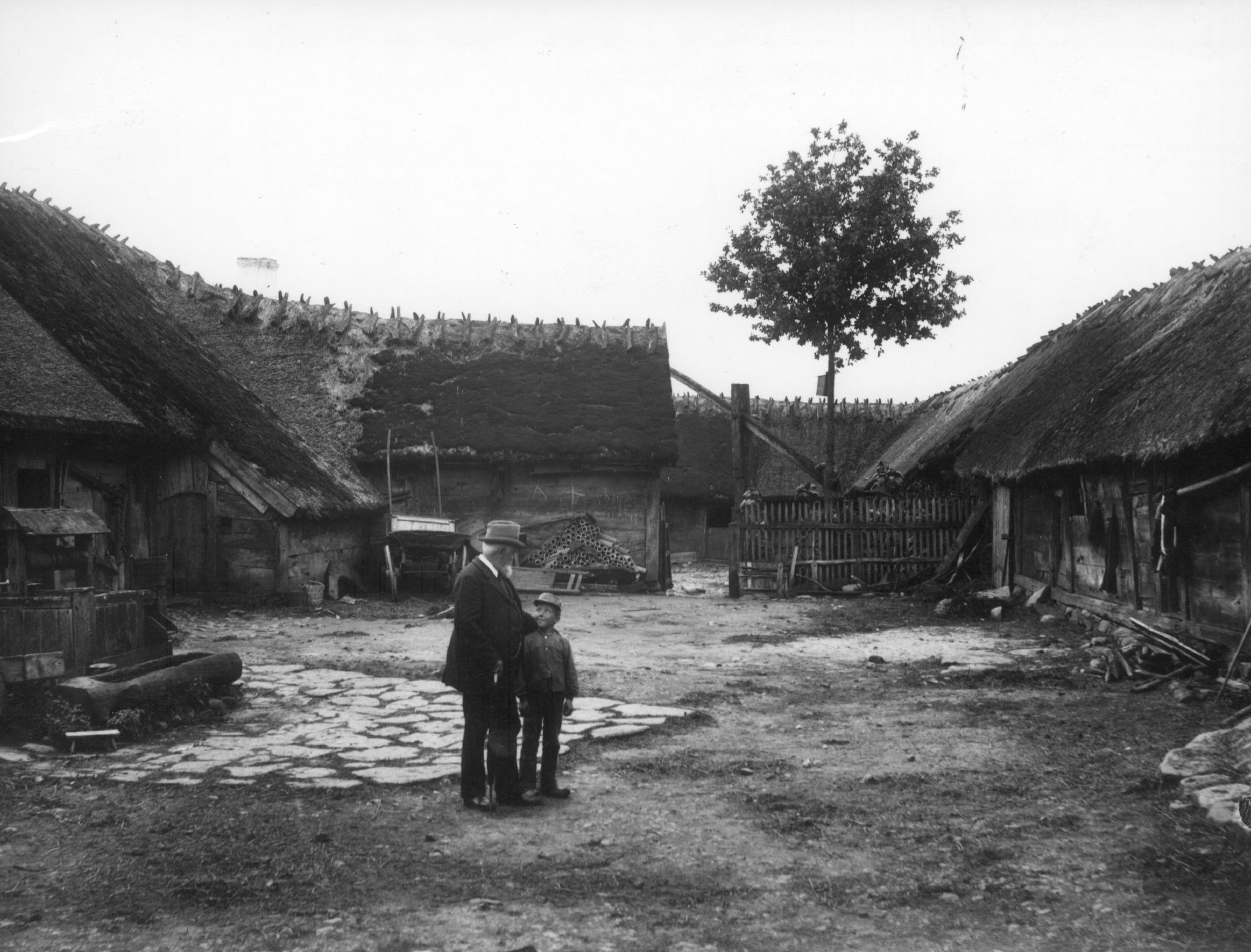 Bernhard Olsen på tvillingegårdens gårdsplads ved besigtigelse af gården på hjemstedet. Står sammen med en dreng, muligvis fra gården.